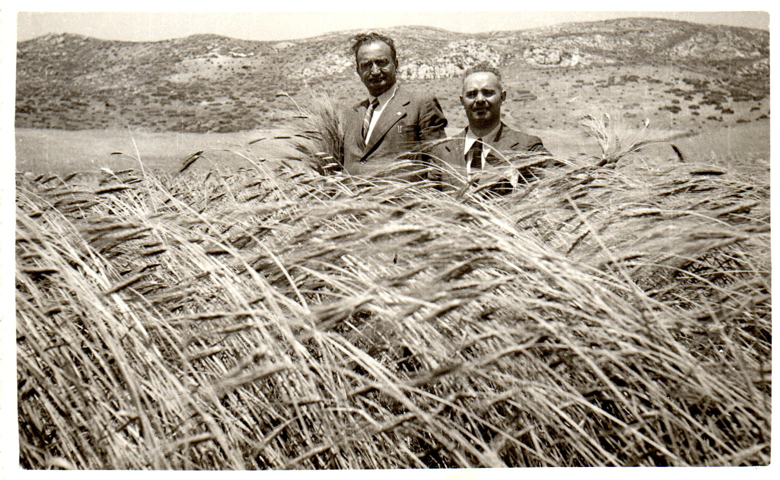 CAmpo di grano Russello nell'entroterra siciliano